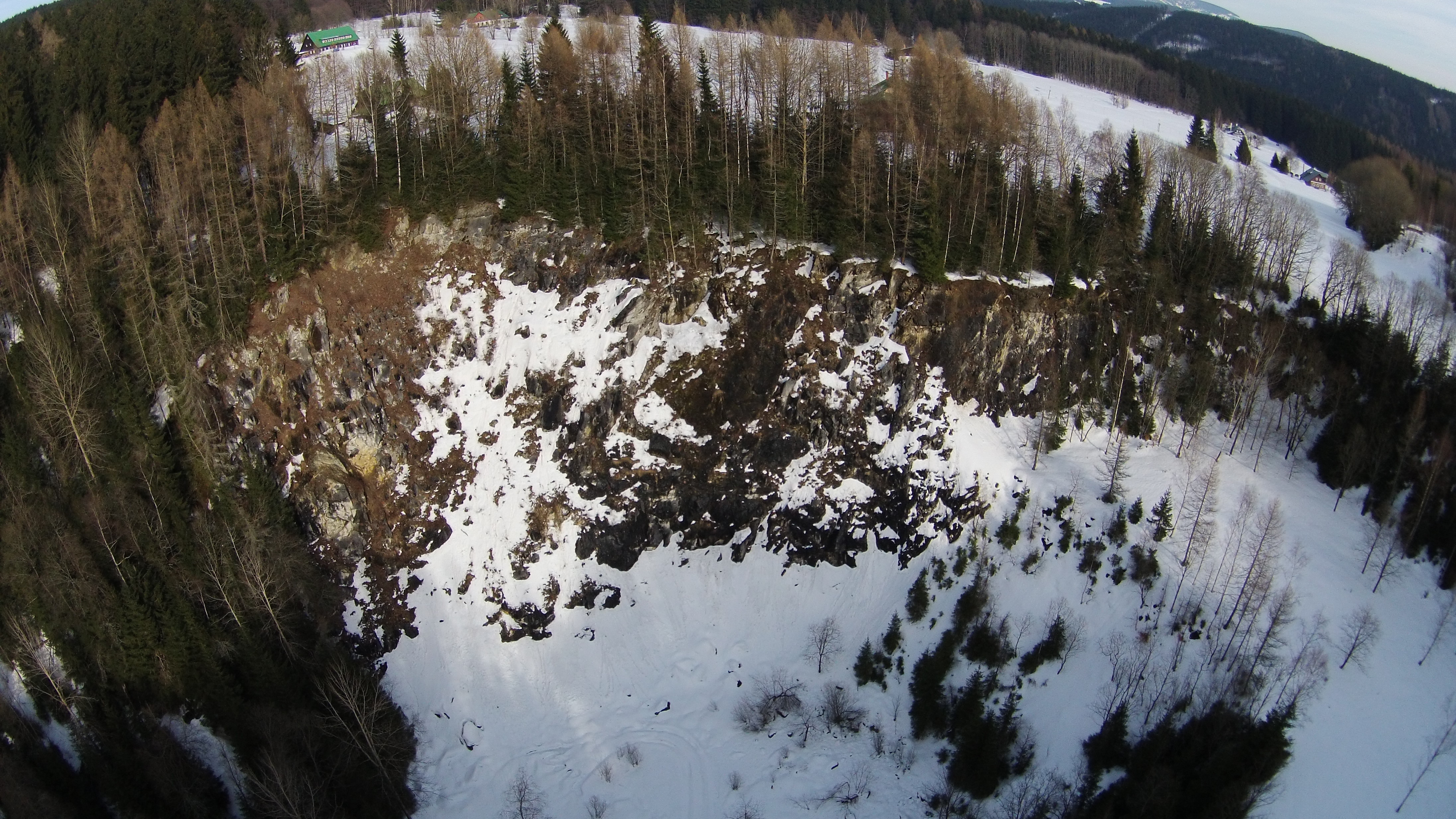 Přírodní památka Lom Strážné. Okres Trutnov, Česká republika.